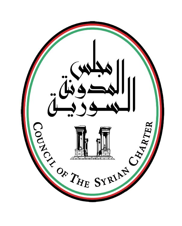 l'armoirie du Conseil de la charte syrienne montre le Tétrapyle de Palmyre